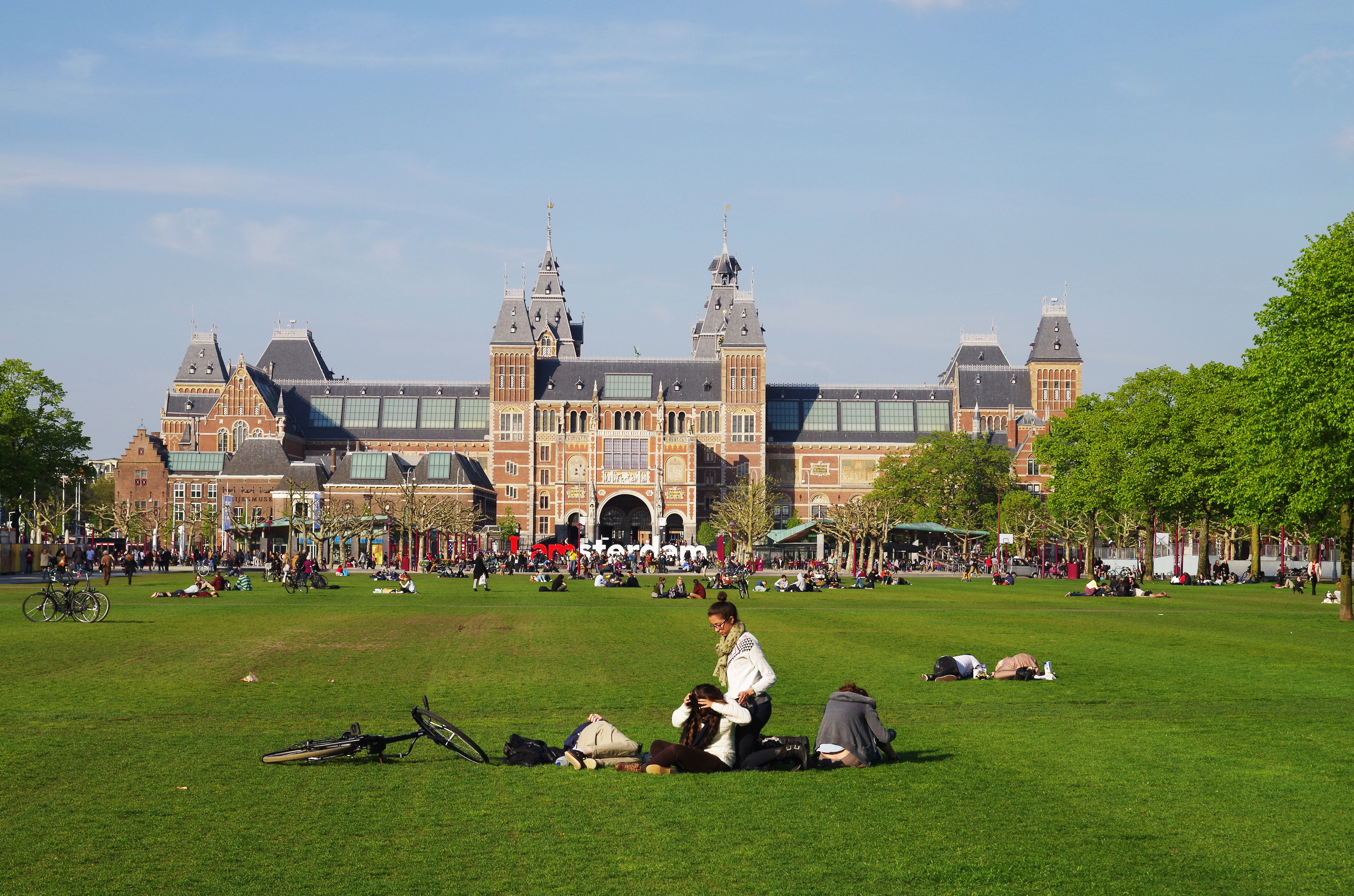 Rijksmuseum Amsterdam Rückseite vom Museumplein